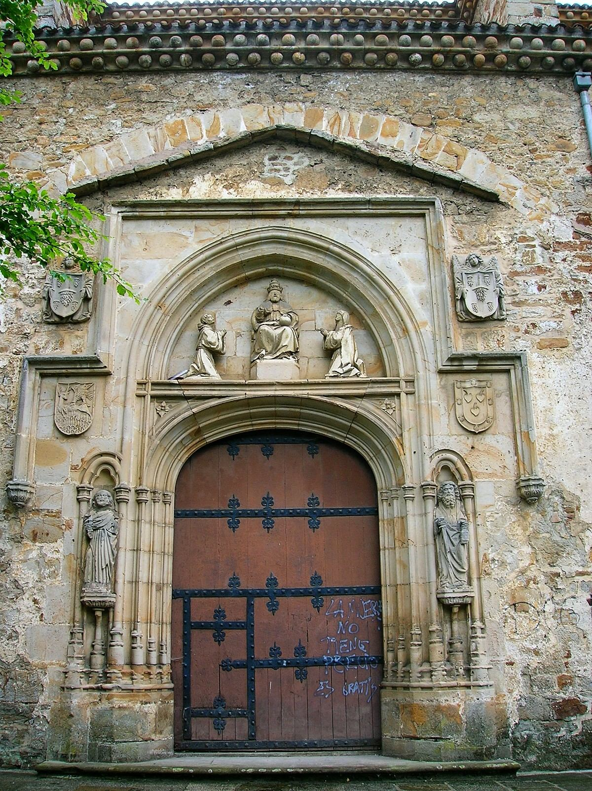 Monasterio de Bidaurreta, Oñate (Guipúzcoa)